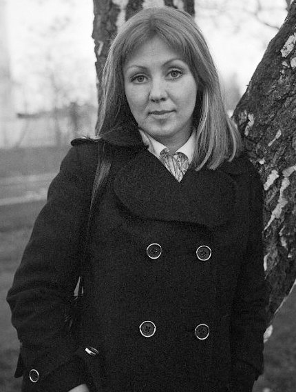 Halász Judit Kossuth- és Jászai Mari-díjas magyar színésznő, énekesnő, érdemes művész, a Halhatatlanok Társulatának örökös tagja